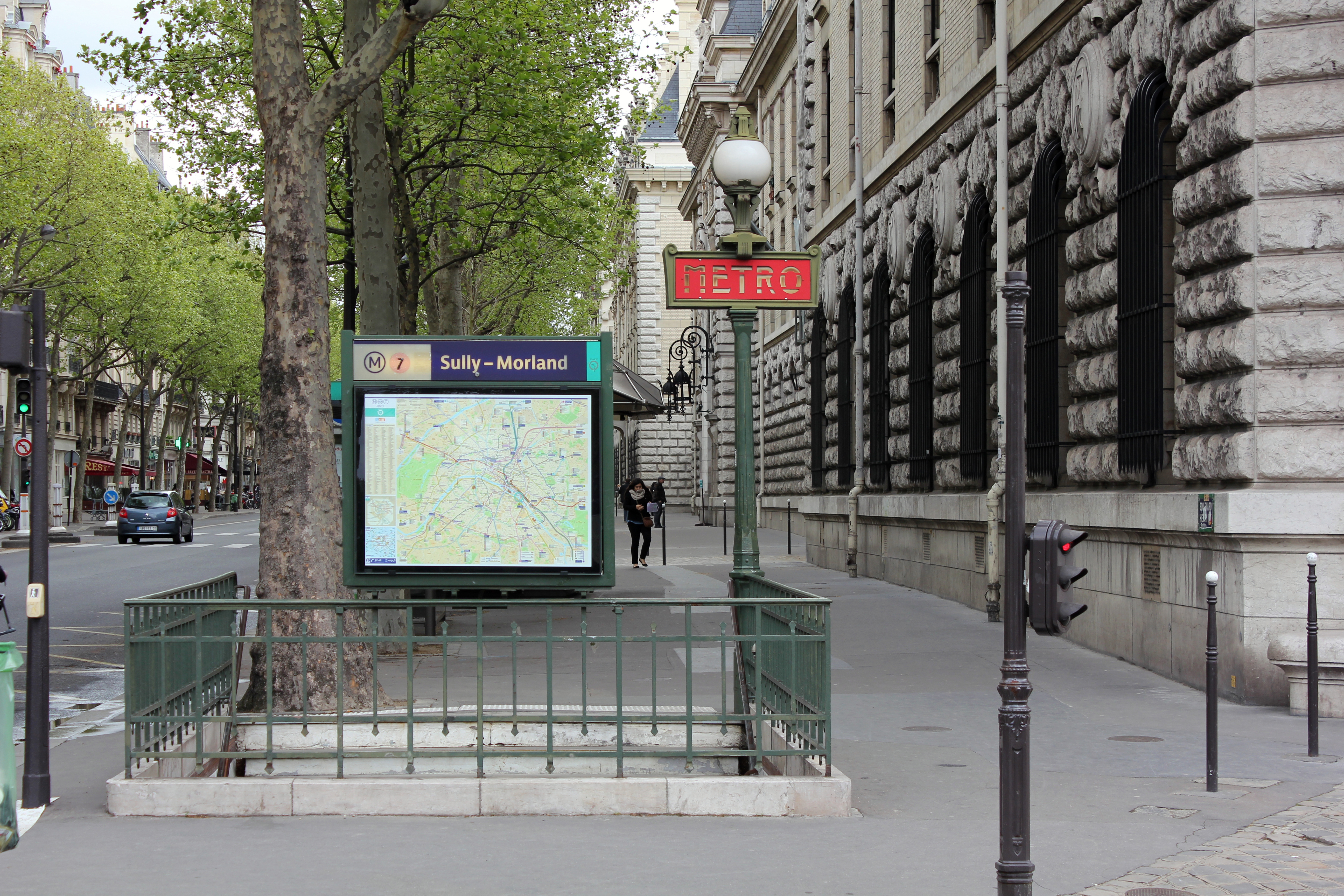 Paris Metro 7 Sully-Morland Eingang